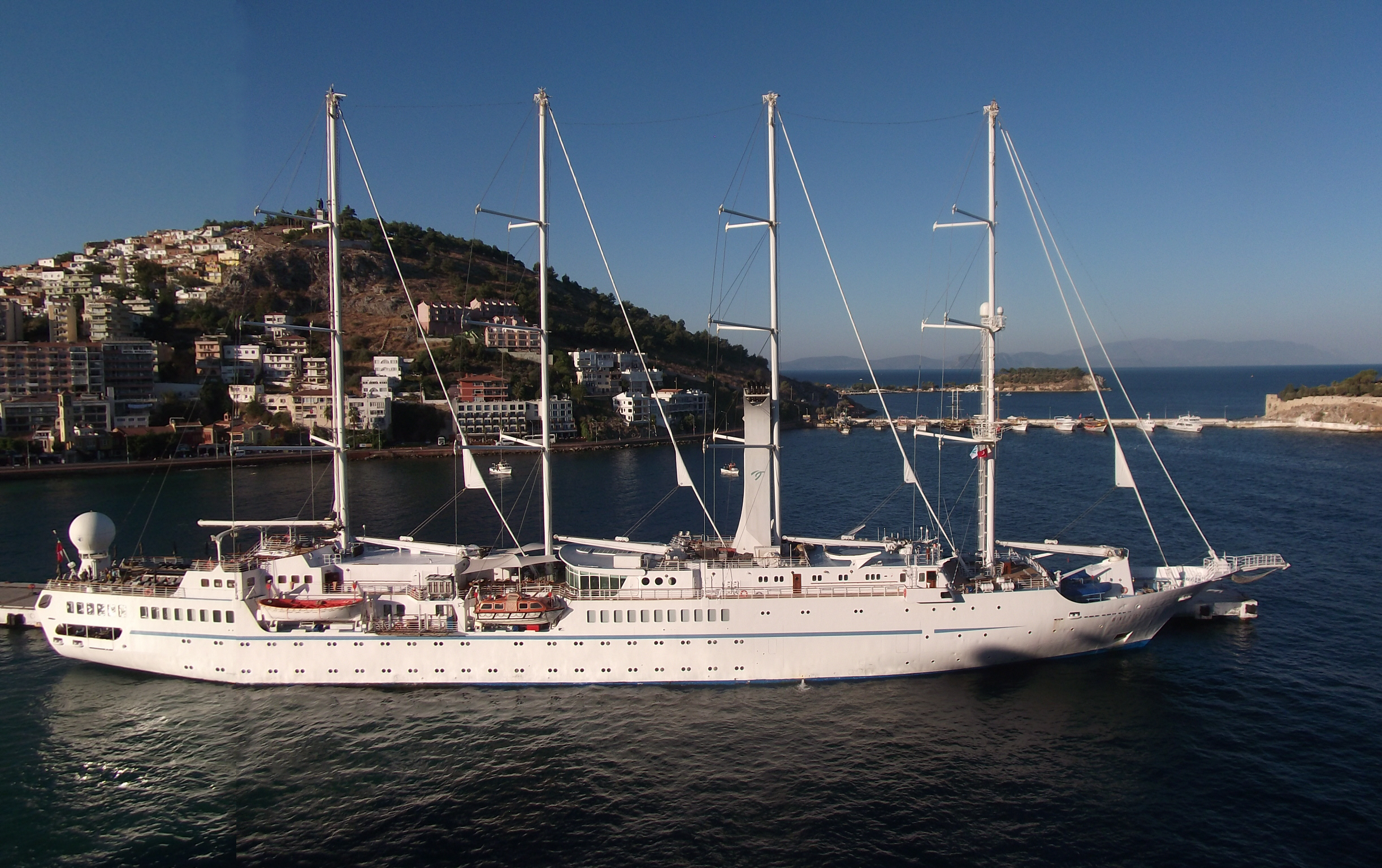 Viermastsegler Wind Star im Hafen von Kusadasi/Türkei IMO: 8420878 MMSI: 309163000 Call Sign: C6CA9 Length x Breadth: 135 m X 18 m